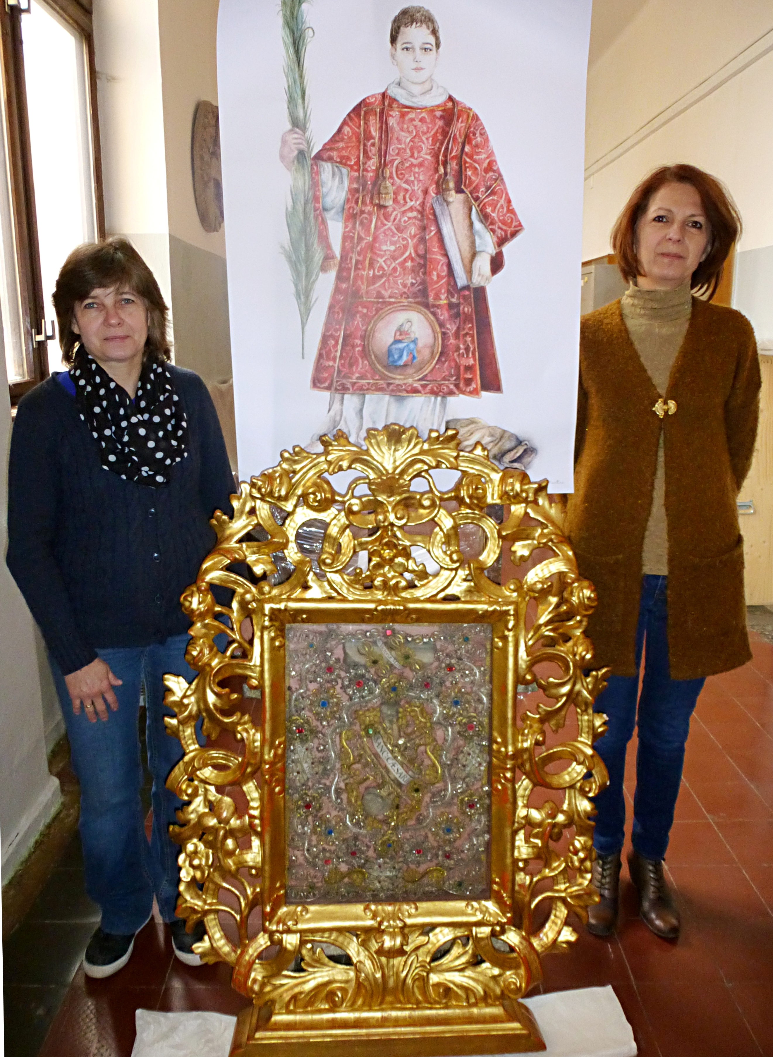 Bratislava (Slovacchia), Museo Nazionale Slovacco - Museo Storico di Bratislava: la dott.ssa Alena Piatrová, curatrice del Museo, e la dott.ssa Jana Agnerová accanto al reliquiario di San Cesario diacono e martire, e all'icona "Caesarius Diaconus" di Giovanni Guida. Relikviár sv. Cézarius z Terraciny, Historicke Muzeum Slovenskeho Narodneho Muzea Bratislava. Na fotografii, PhDr. Alena Piatrová, kurátorkou Historického múzea SNM v Bratislave, a Jana Agnerová .